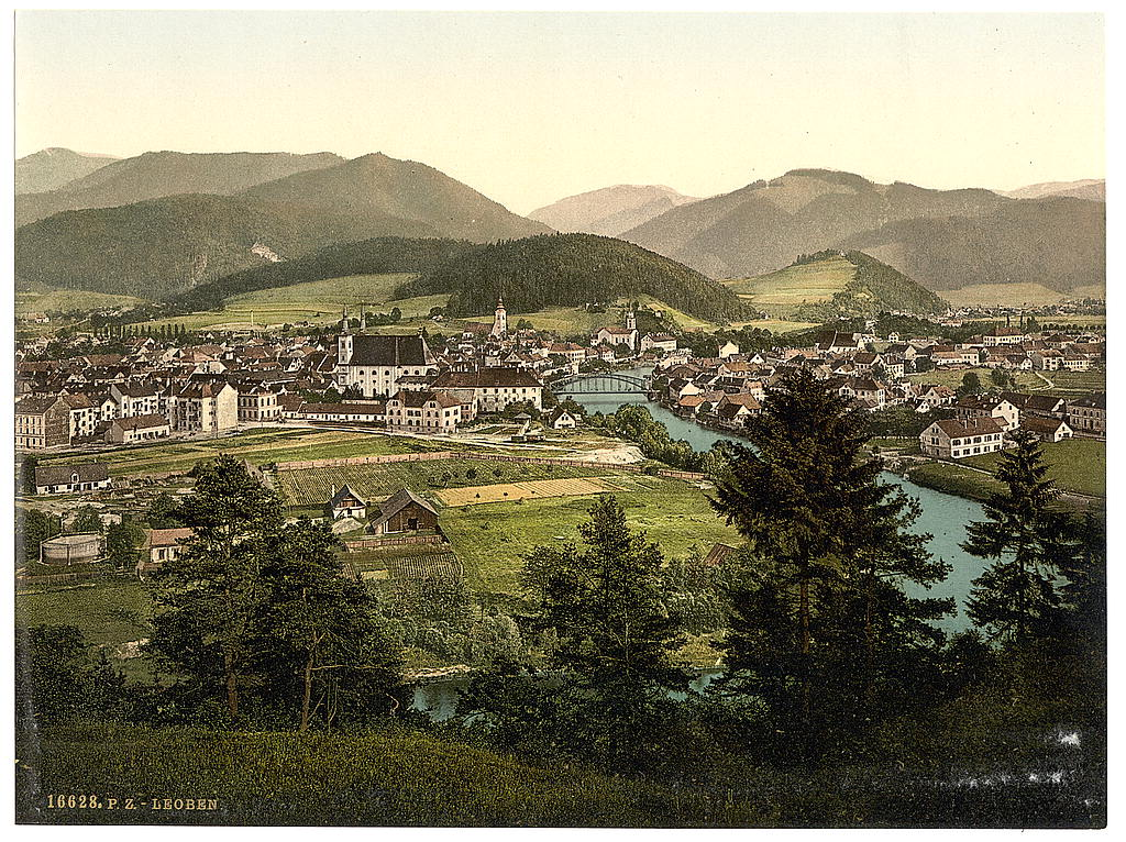 Leoben um 1900 Quelle: Autor: Robert Lizenz: Public Domain